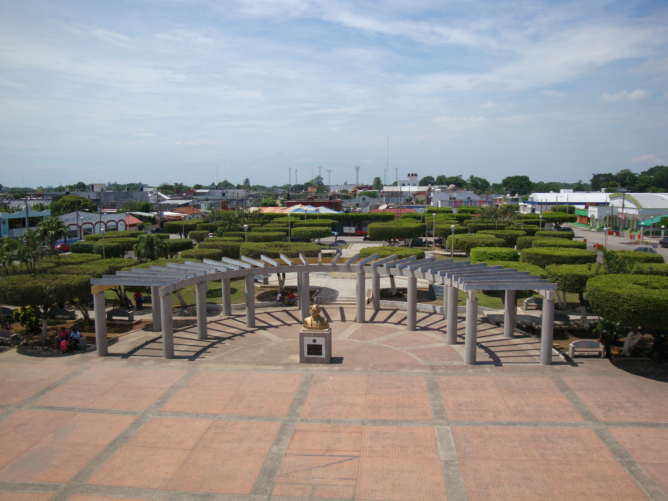 Panorámica del parque Juárez, de la ciudad de Huimanguillo, Tabasco, México.